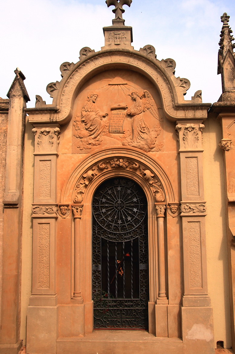 Vista general hipogeus de segona(Lloret de Mar-La Selva-Catalunya), dins del cementiri modernista de Lloret de Mar (1901)